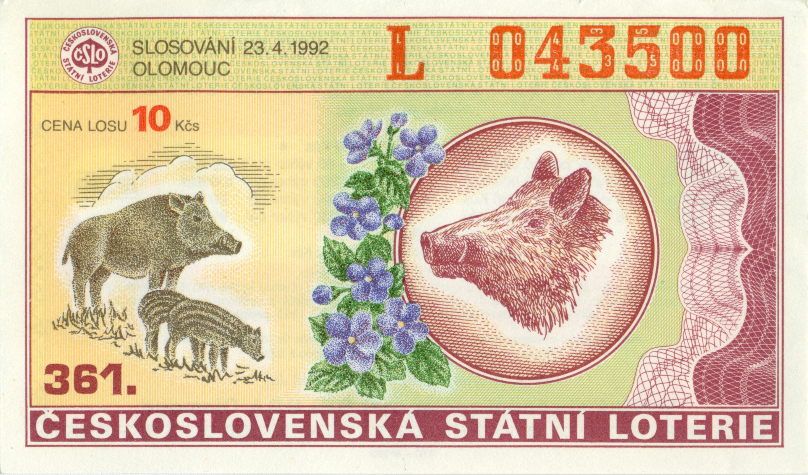 vývoj losů